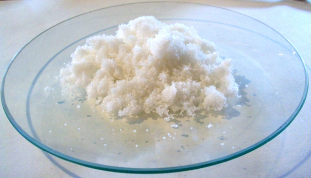 KHCO3